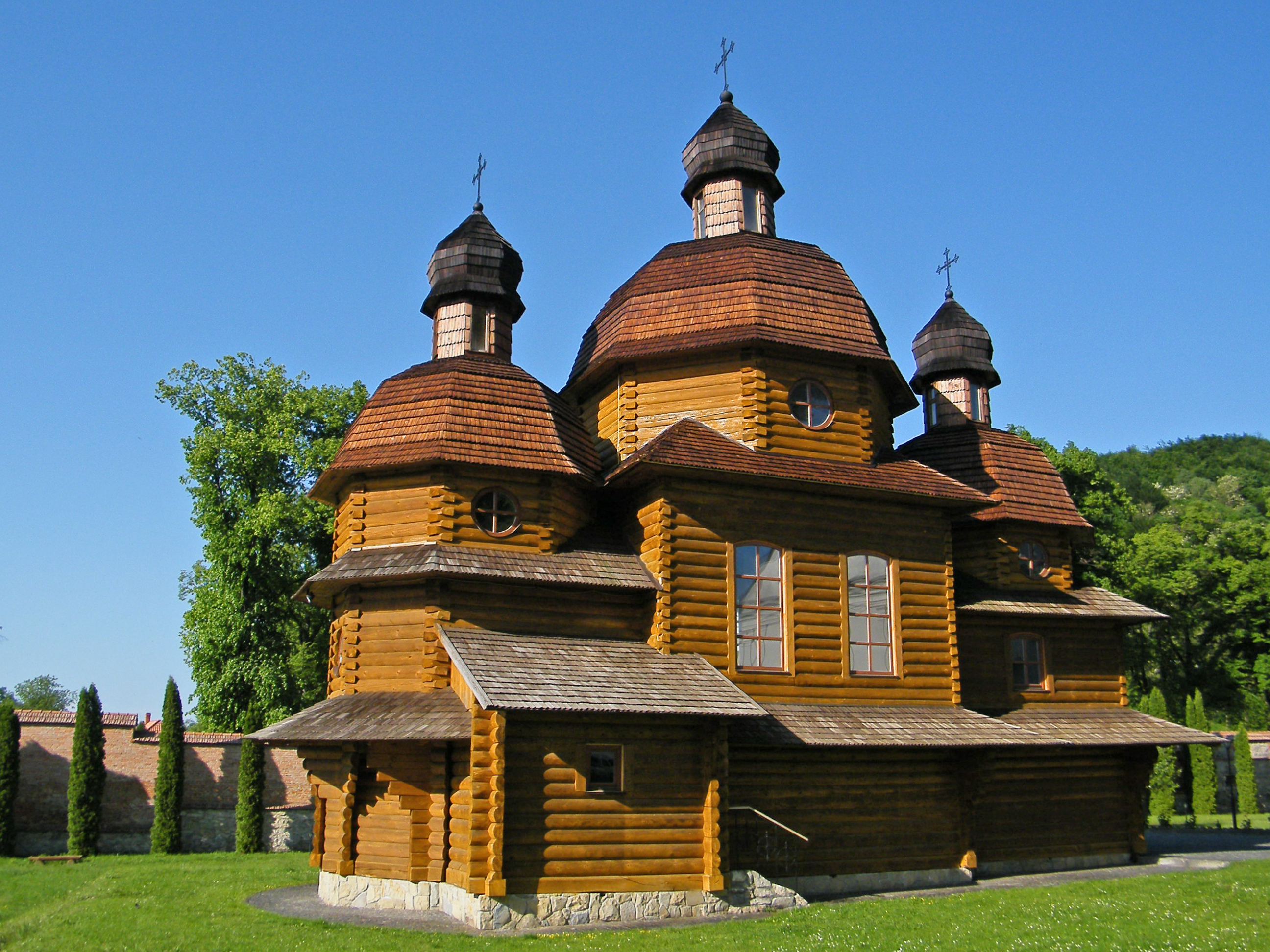 Восстановленная деревянная церковь